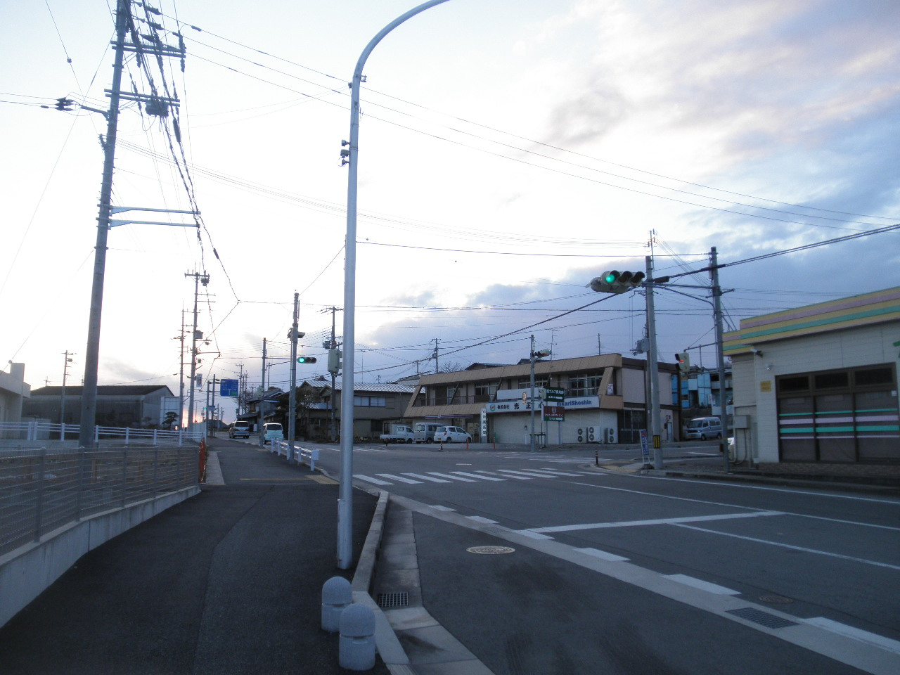 兵庫県三木市吉川町吉安